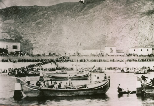 Regata a Uliveto terme